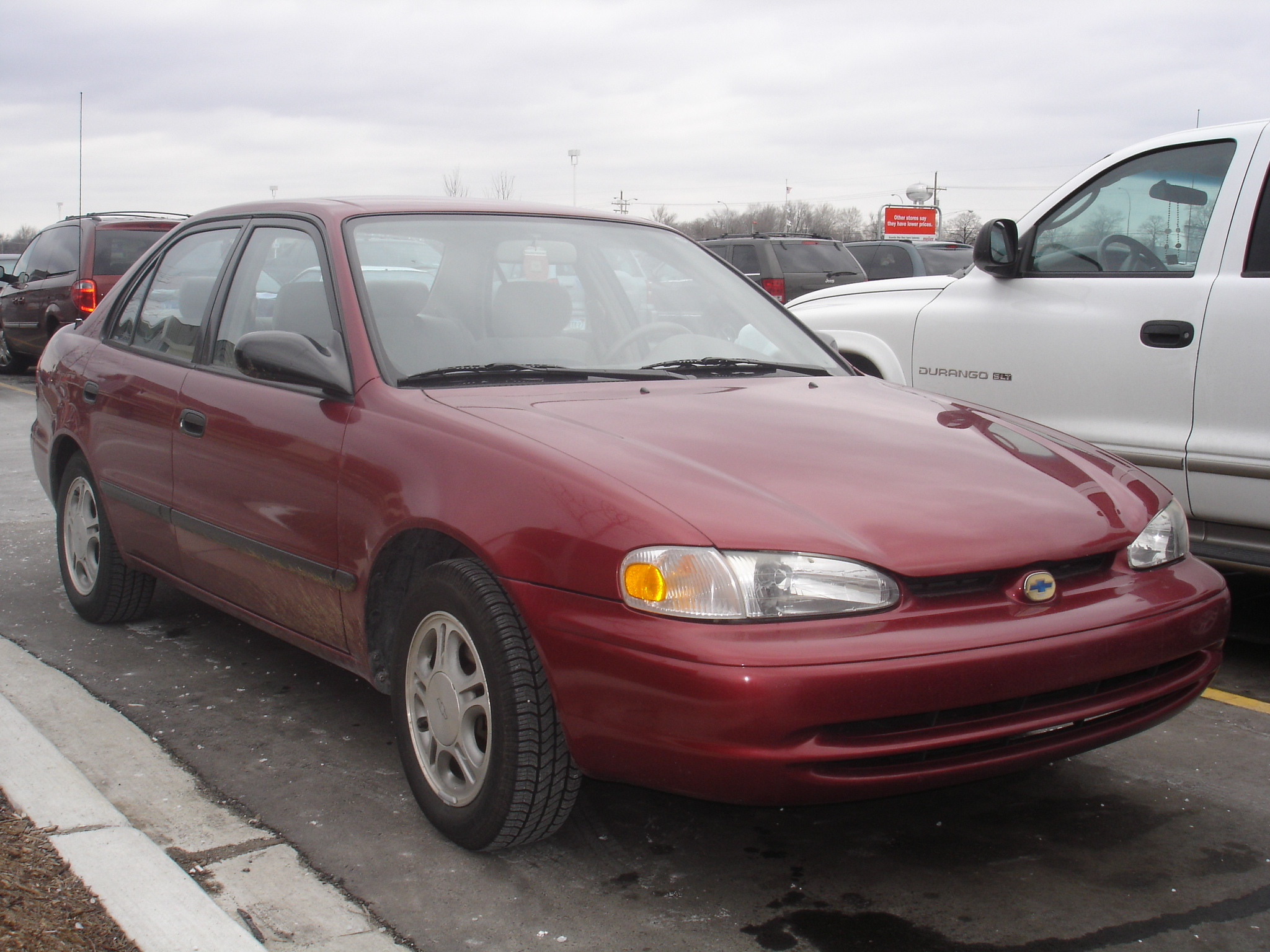 1999 Chevrolet Prizm